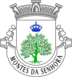 BrazÃ£o da freguesia de Montes da Senhora